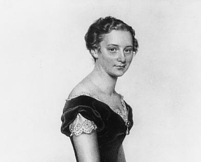 Henriette Treffz. Lithographie von J. Kriehuber.